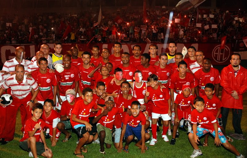 Equipe campeã em 2009 do América da Segunda Divisão de Profissionais do Rio de Janeiro, acompanhada de Romário, que jogou a última partida da rodada contra o Artsul. Foto cedida por Carlos Silva.